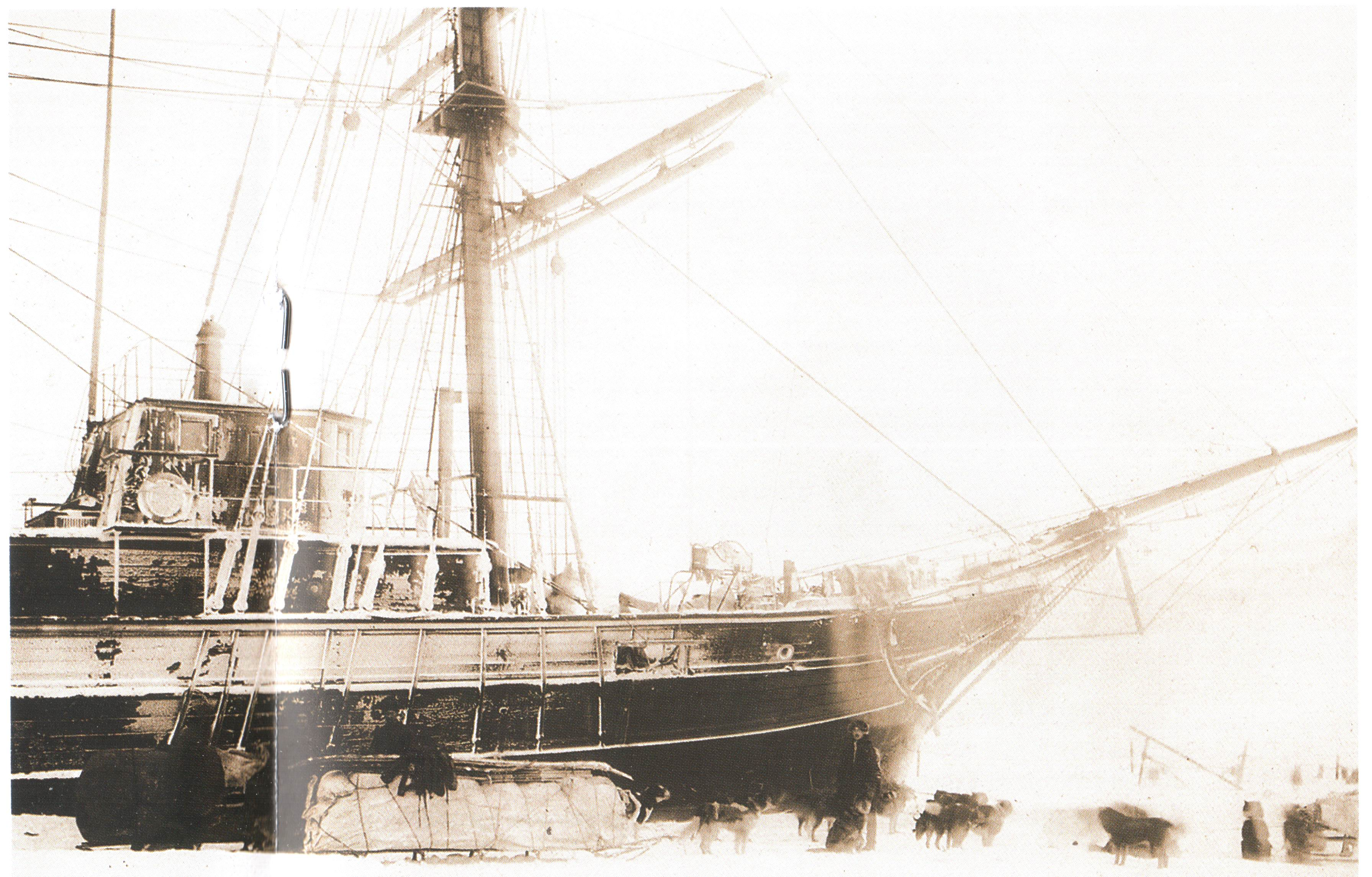 Э.В. Толль и А.В. Колчак отправляются в поездку к Восточному Таймыру, 1900 г.